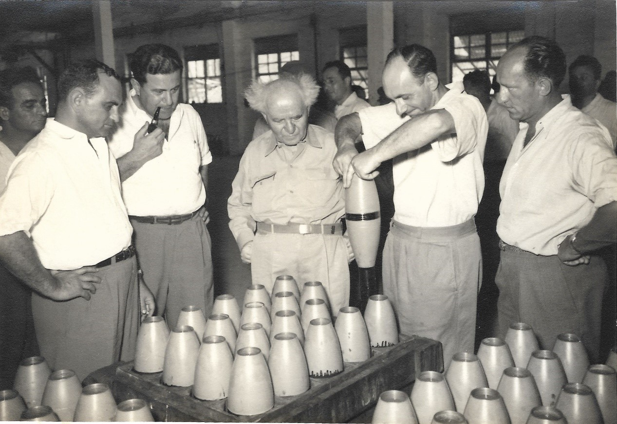 מאיר גירון בין מקבלי פניו של ראש הממשלה דוד בן גוריון במפעל סולתם ביקנעם 1956